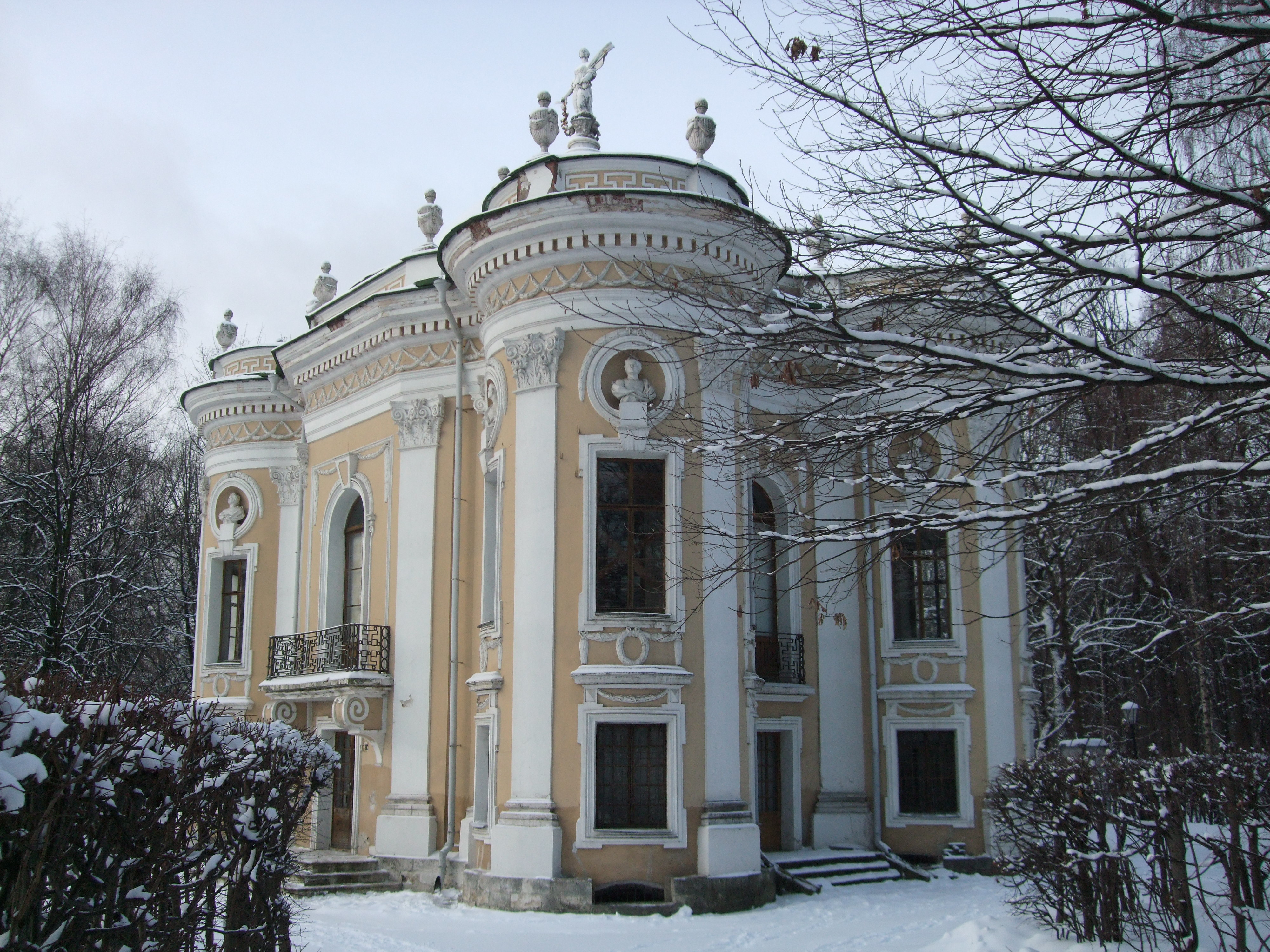 Россия, город Москва, усадьба Кусково. Эрмитаж